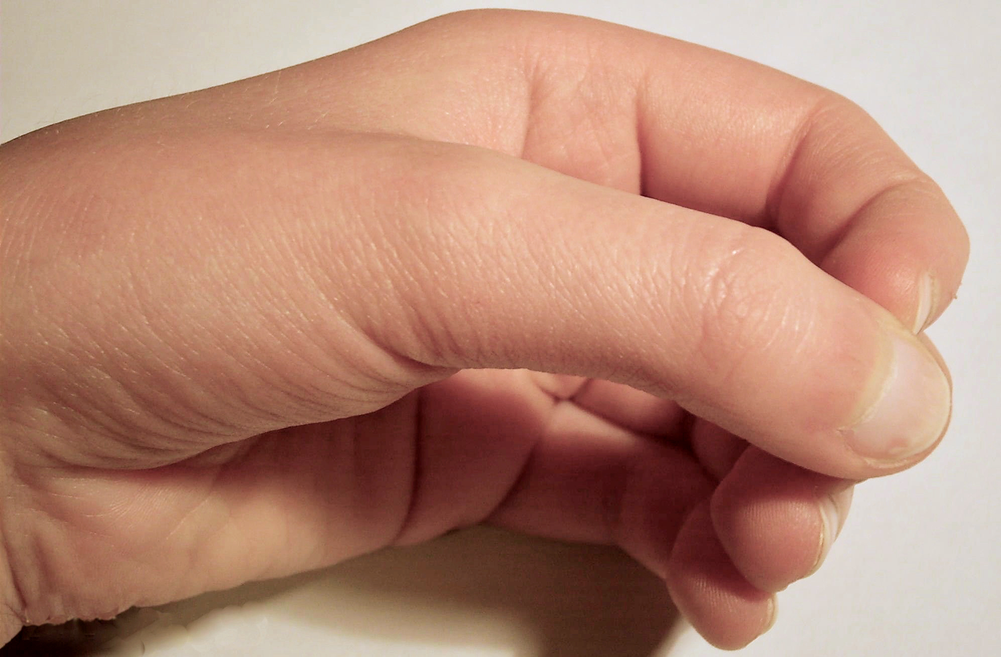 Das zusätzliche Handzeichen "Brunnen" im Spiel Schere-Stein-Papier